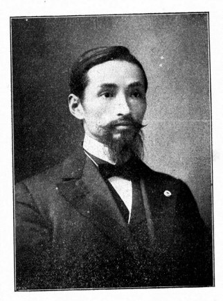 中文（台灣）: 中華民國國會議員